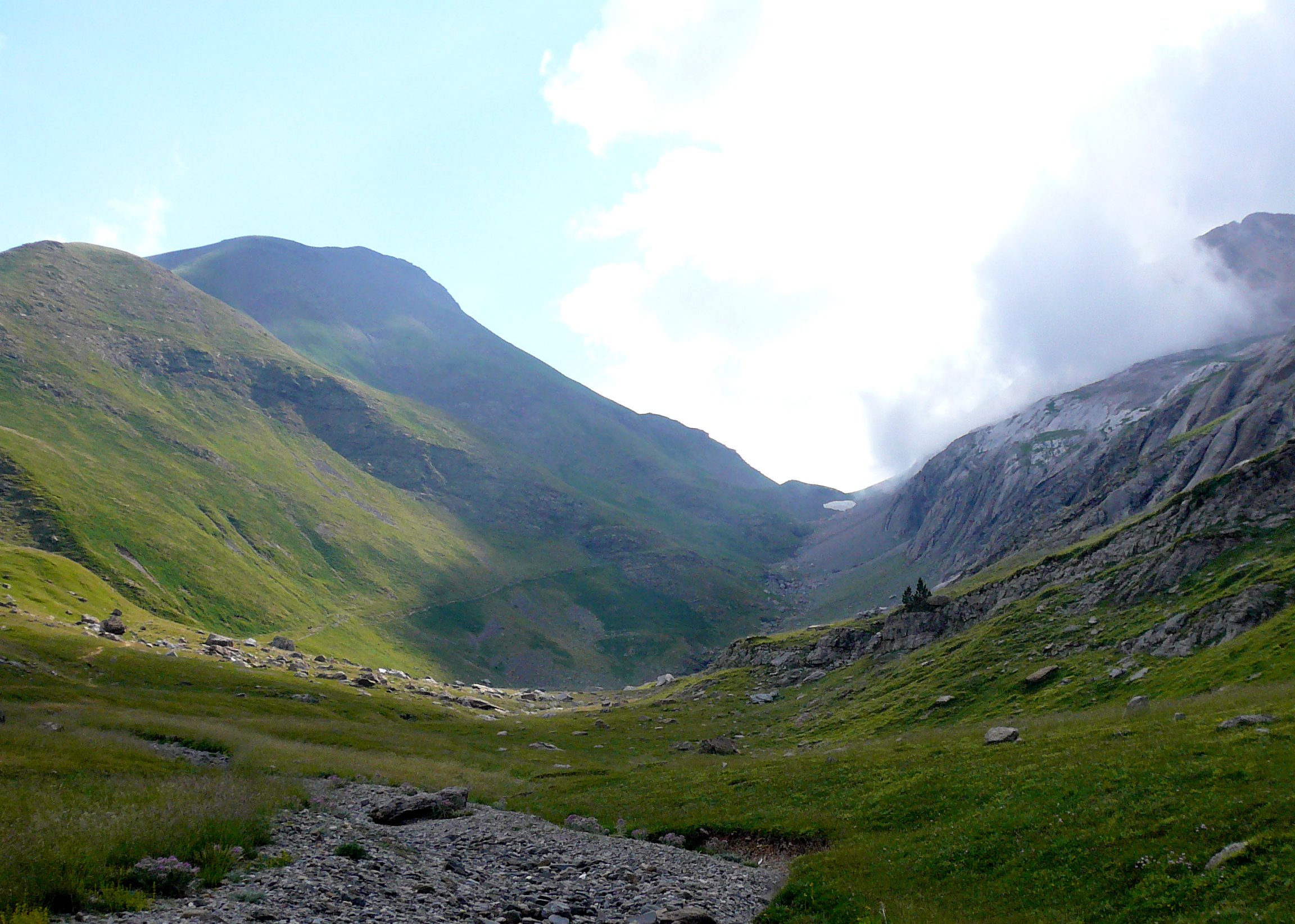 Port de Boucharo, côté espagnol